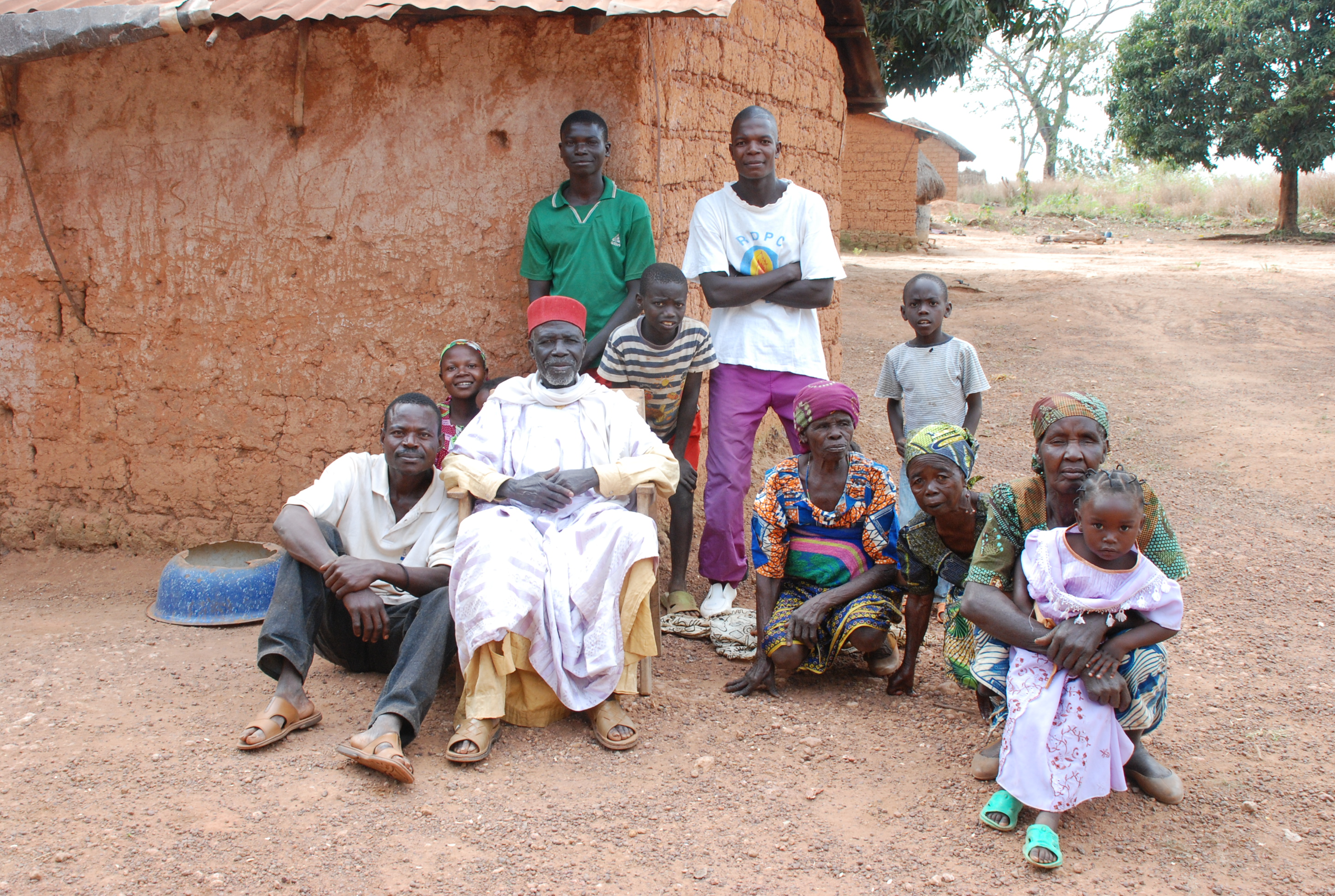 Famille tchadienne This is an image of Cultural Fashion or Adornment from Cameroon